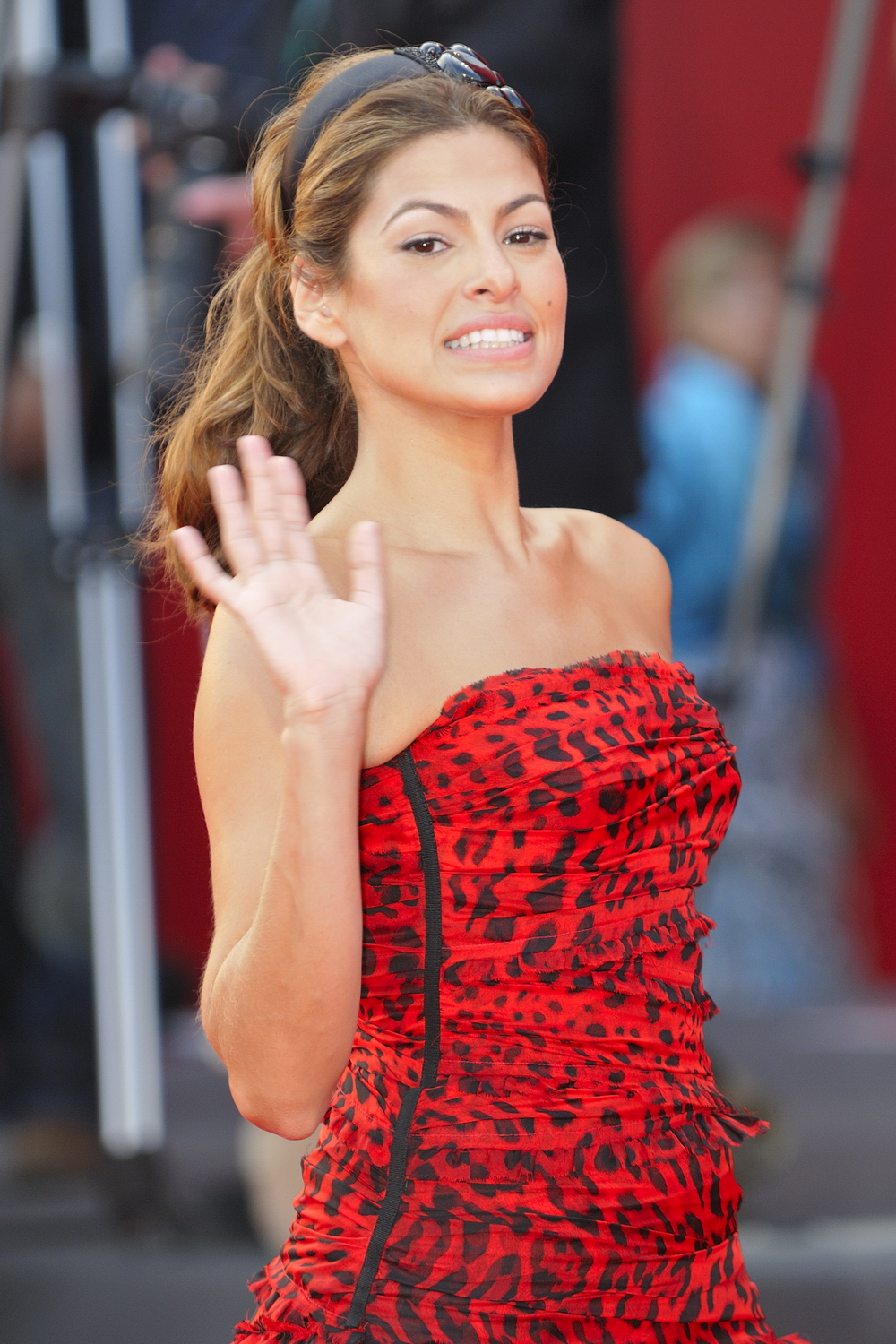 66ème Festival du Cinéma de Venise (Mostra). Eva Mendes arrivant sur le Tapis Rouge lors de la soirée d'ouverture du Festival de Venise.